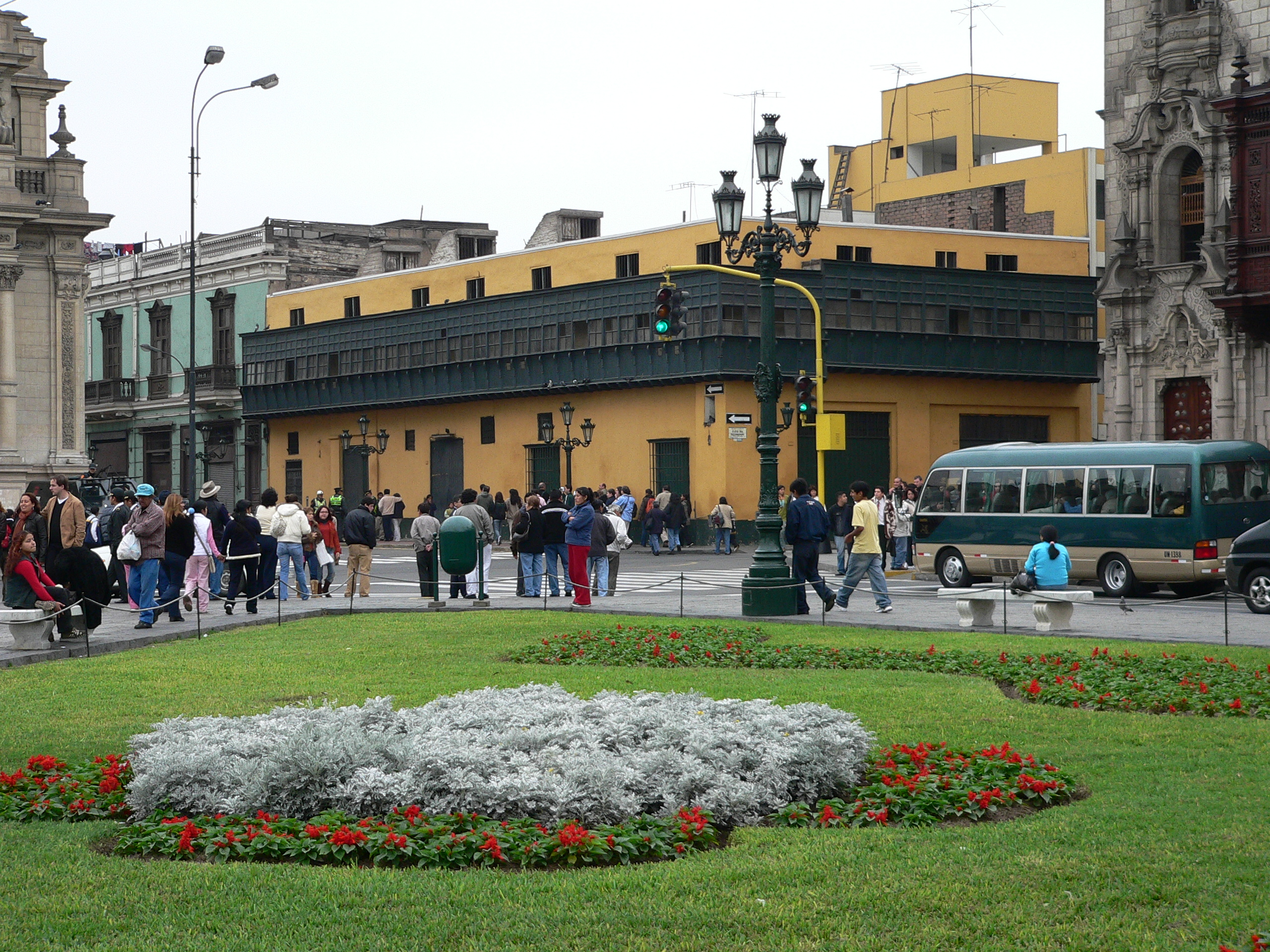 Descripción: Casa del Oidor Lugar: Centro Histórico de Lima Distrito : Cercado de Lima Ciudad : Lima País : Perú Fotógrafo: © Manuel González Olaechea y Franco Fecha de la foto : 8 de julio de 2007